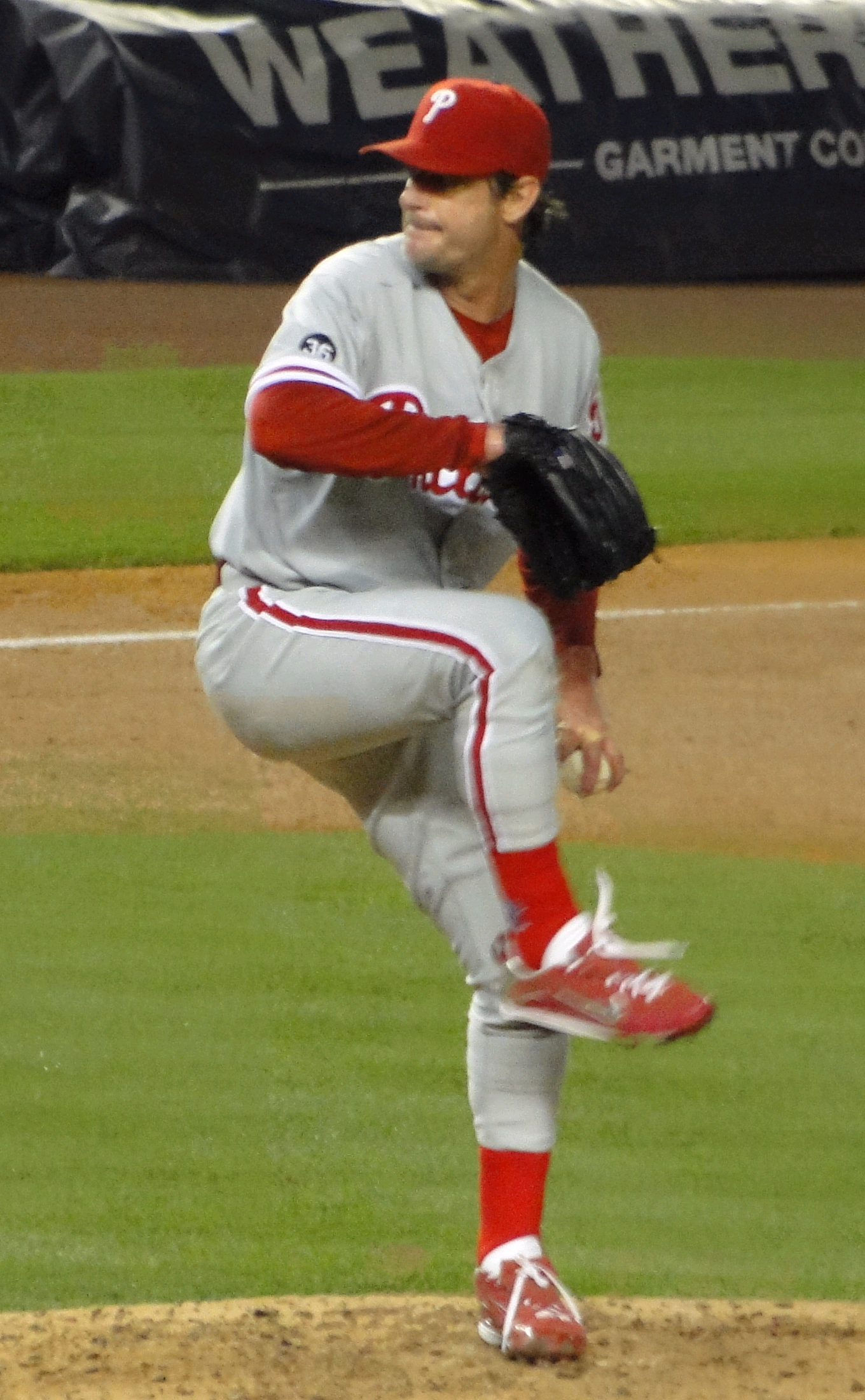 Jamie Moyer